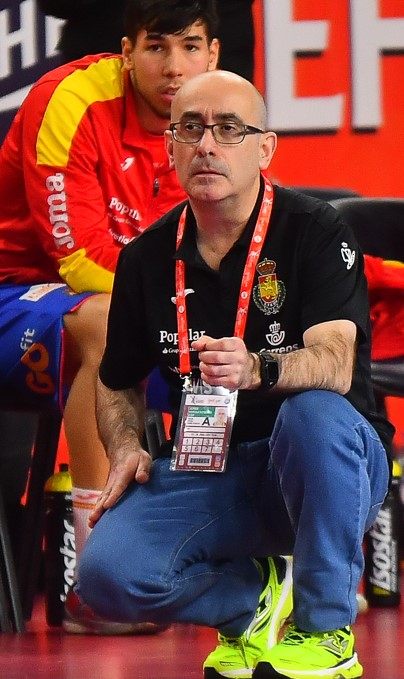 EHF EURO 2018 Makedonija-Spanija, 21.01.2018